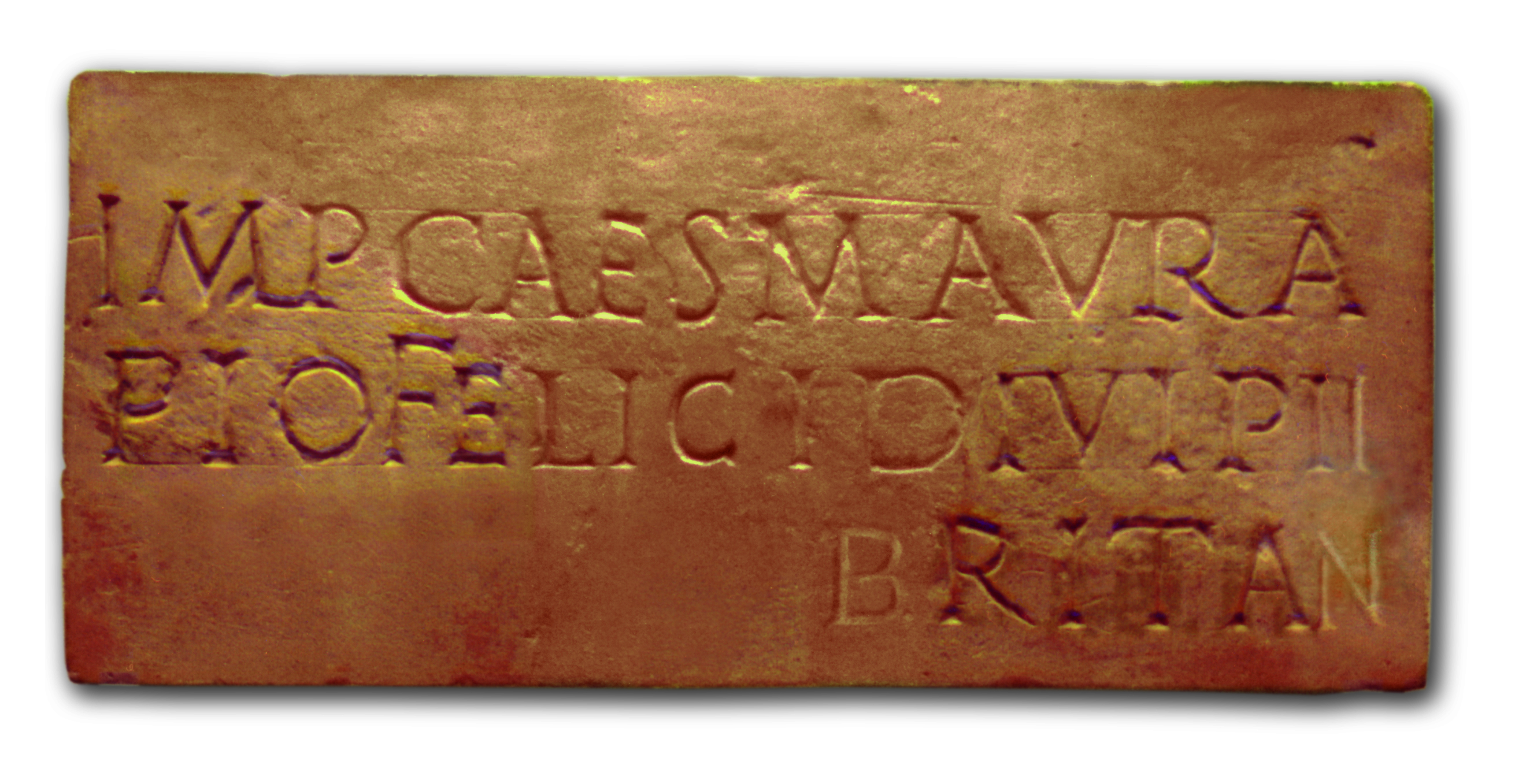 Fragment einer Ehreninschrift für Kaiser Caracalla. CIL III, 11921, aus dem Kastell Pförring, Raetia, Bayern. Kopie im Römermuseum Weißenburg. Das Original ist verloren.